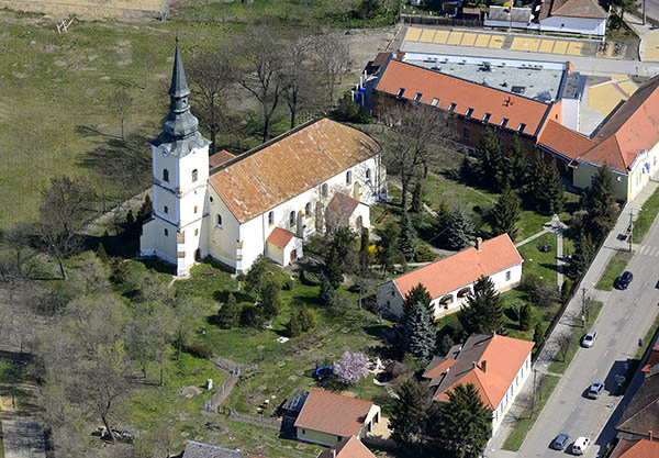 Légi fotó Nádudvarról, Református templom. azonosító 5367 (törzsszám: 1910). - Nádudvar, Fő u. -barokk, 1774. Átalakítva 1878-ban. Keleti portikusza 1805-ben épült.